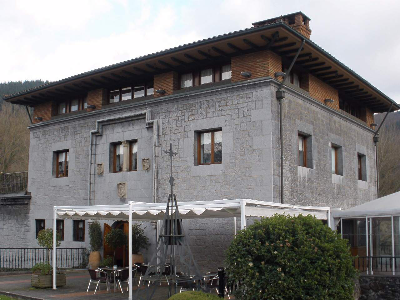 Palacio Anuntzibai (Llodio, Álava)